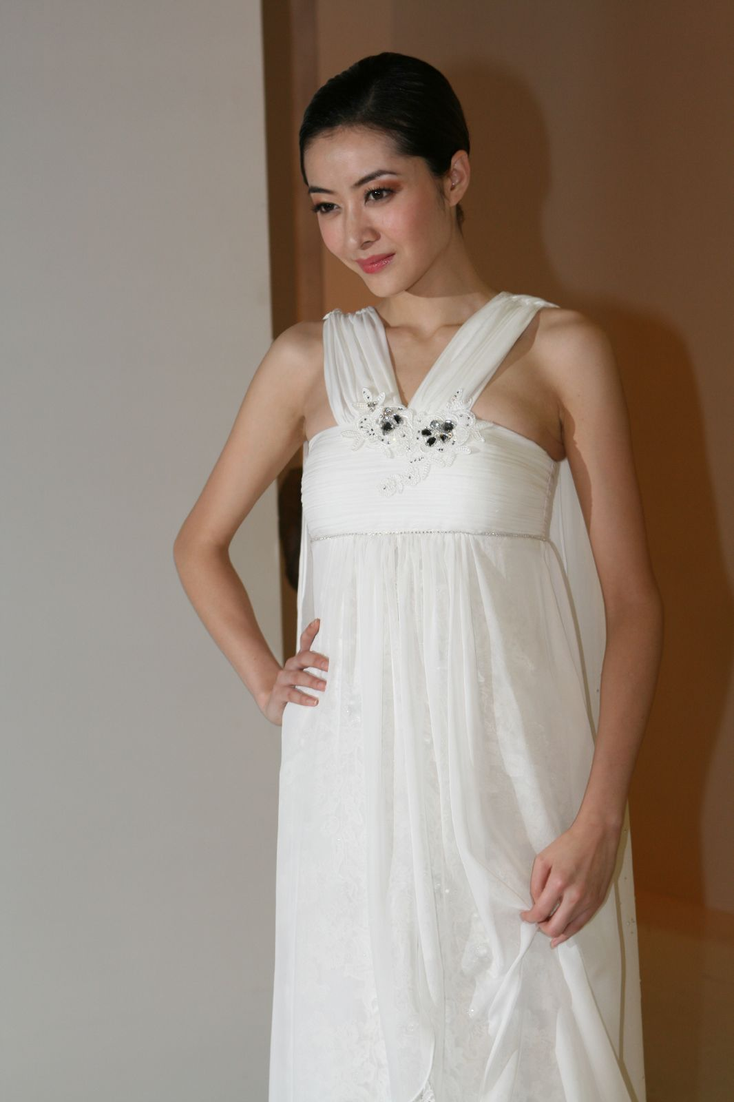 Lynn Hung